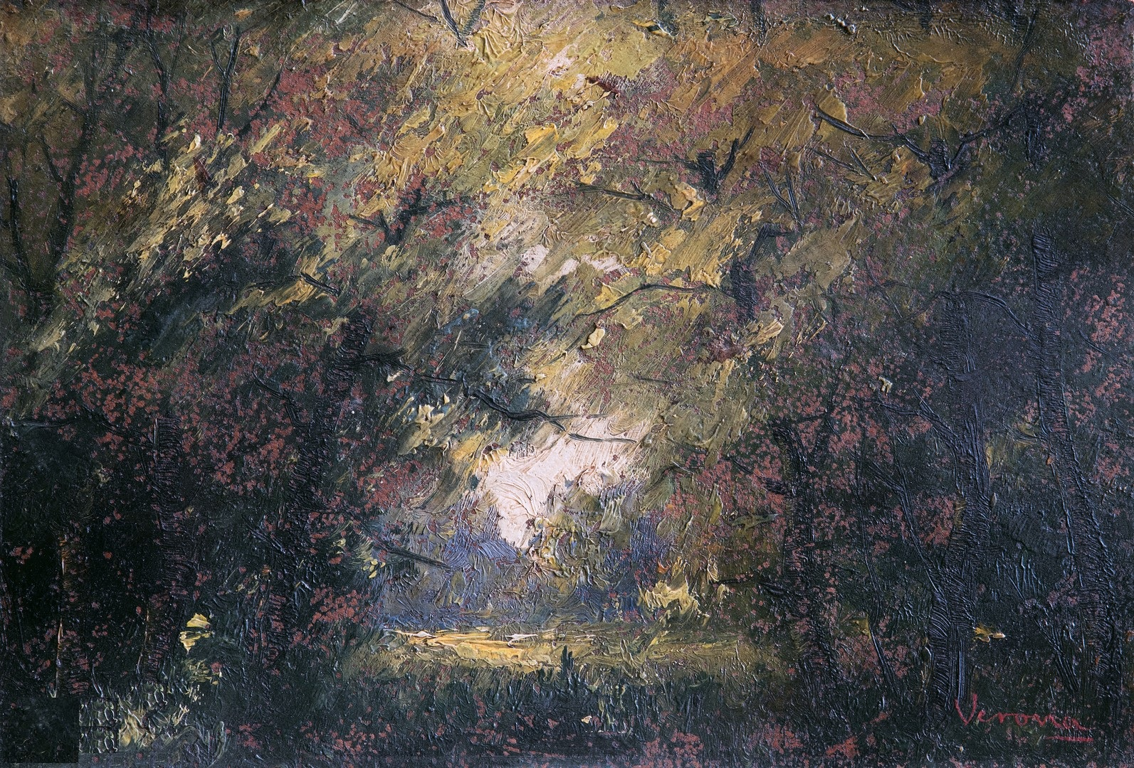 Luminiș în codrii Herței - Ulei pe carton. Peisaj cu pădurea Herței. Semnat dreapta jos, cu roșu venețian – VERONA.